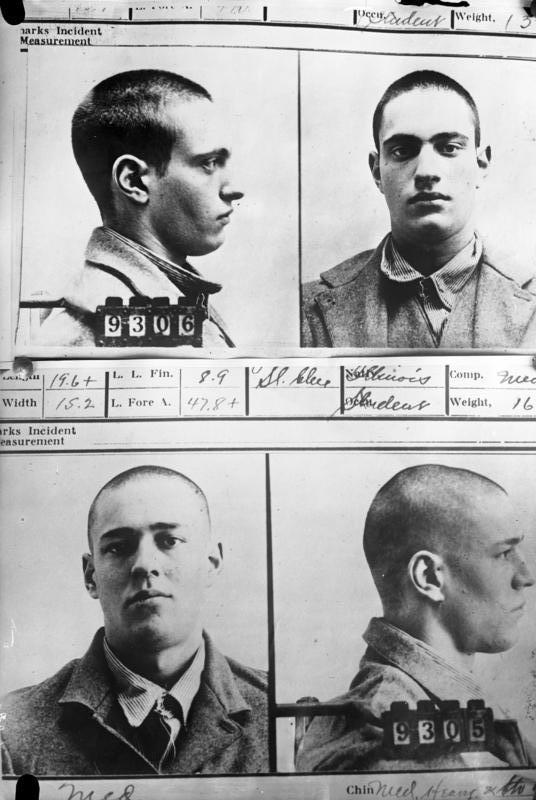 Millionärssöhne als lebenslängliche Zuchthäusler Die amerikanischen Millionärssöhne Natahn Leopold (oben) und Richard Loeb (unten), welche vor 6 Jahren den Sohn des amerikanischen Millionärs Frank aus Sensationslust ermordeten und zu lebenslänglichen Zuchthausstrafen verurteilt wurden. Die Eltern der jugendlichen Mörder versuchen seit Jahren unter Aufwendung großer Geldmittel unter Aufrollung eines Riesenprozesses ihre Kinder freizubekommen